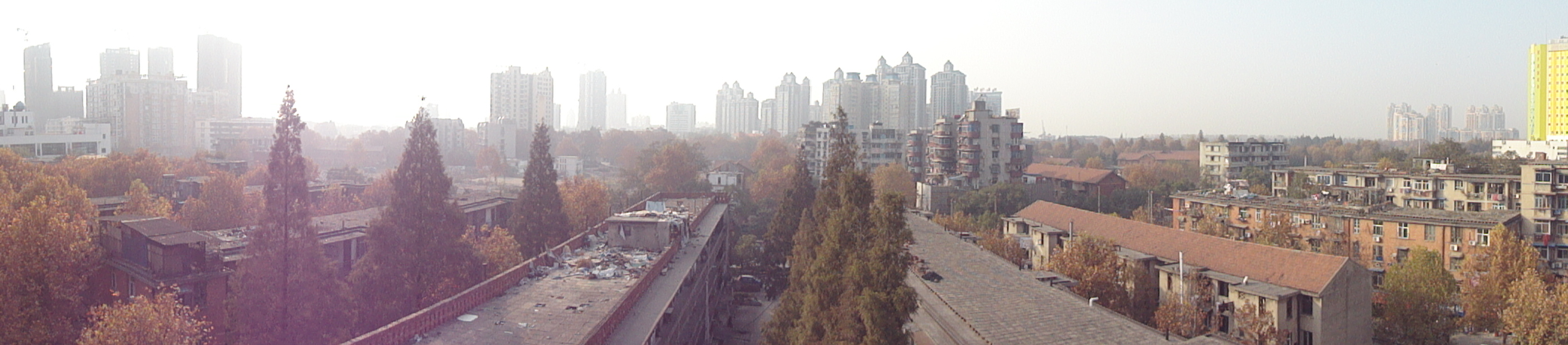 八大家全貌